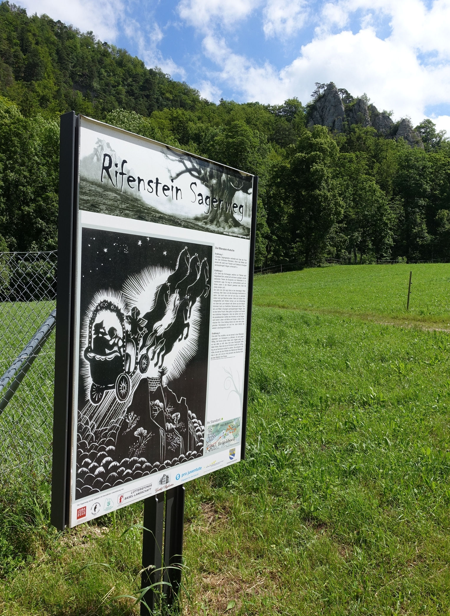 Ryfensteiner Sagenweg in Reigoldswil. Die Reifensteinkutsche, Bleischnitt, von Walter Eglin (1895–1966)